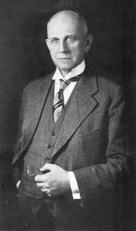 Photo de Joseph-Auguste Frigon. Imprimée comme photo de député. Numérisé d'une copie imprimée, avec sous la photo la légende «J. A. Frigon, M.P.P., comté de St-Maurice».